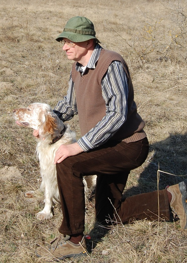 Gallé László Széchenyi-díjas biológus, egyetemi tanár